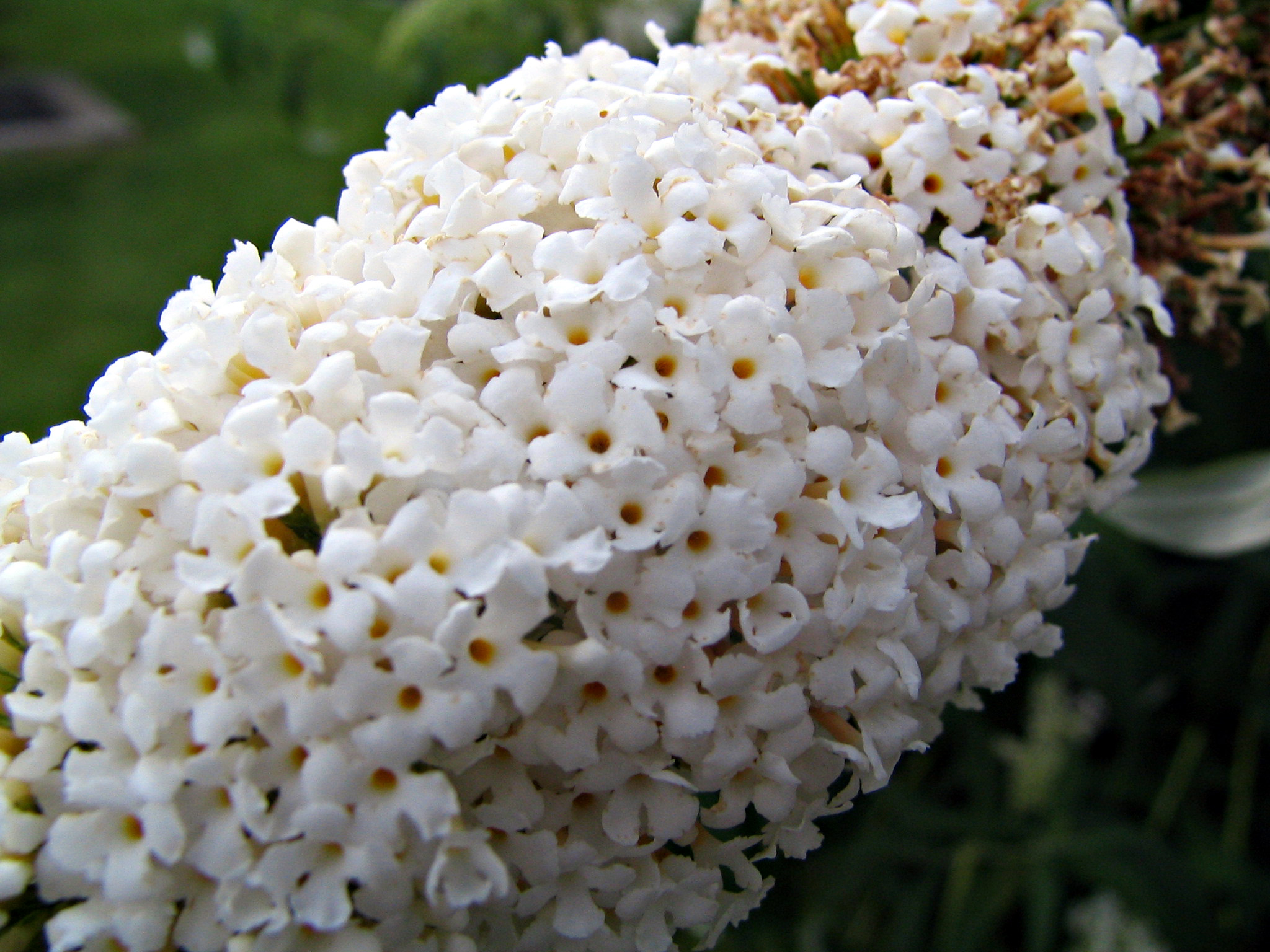 Buddleja davidii цваст, Градска скупштина, Београд (аутор: Михаило Грбић).